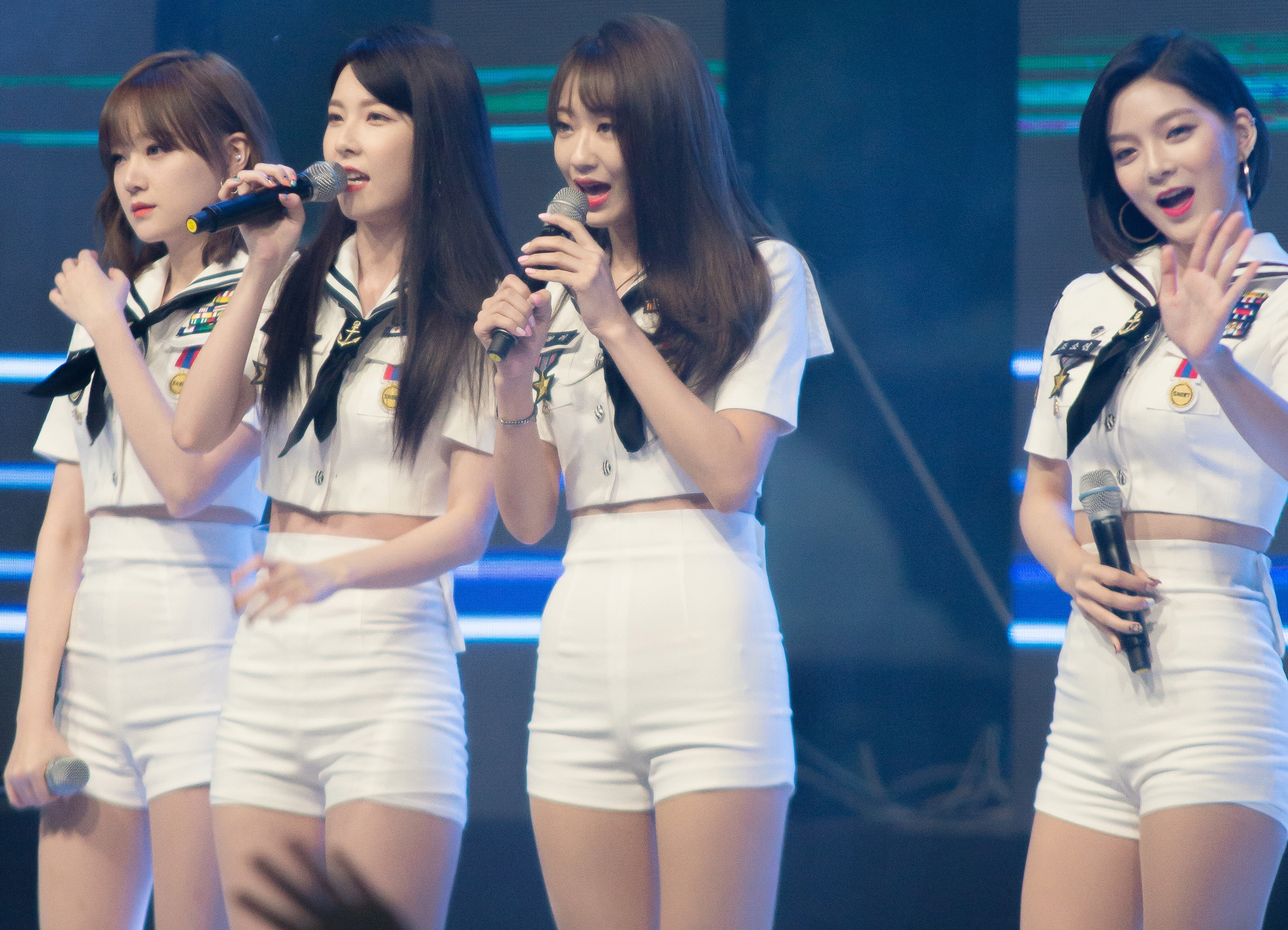 160908 순천향대학교 축제 - 나인뮤지스A